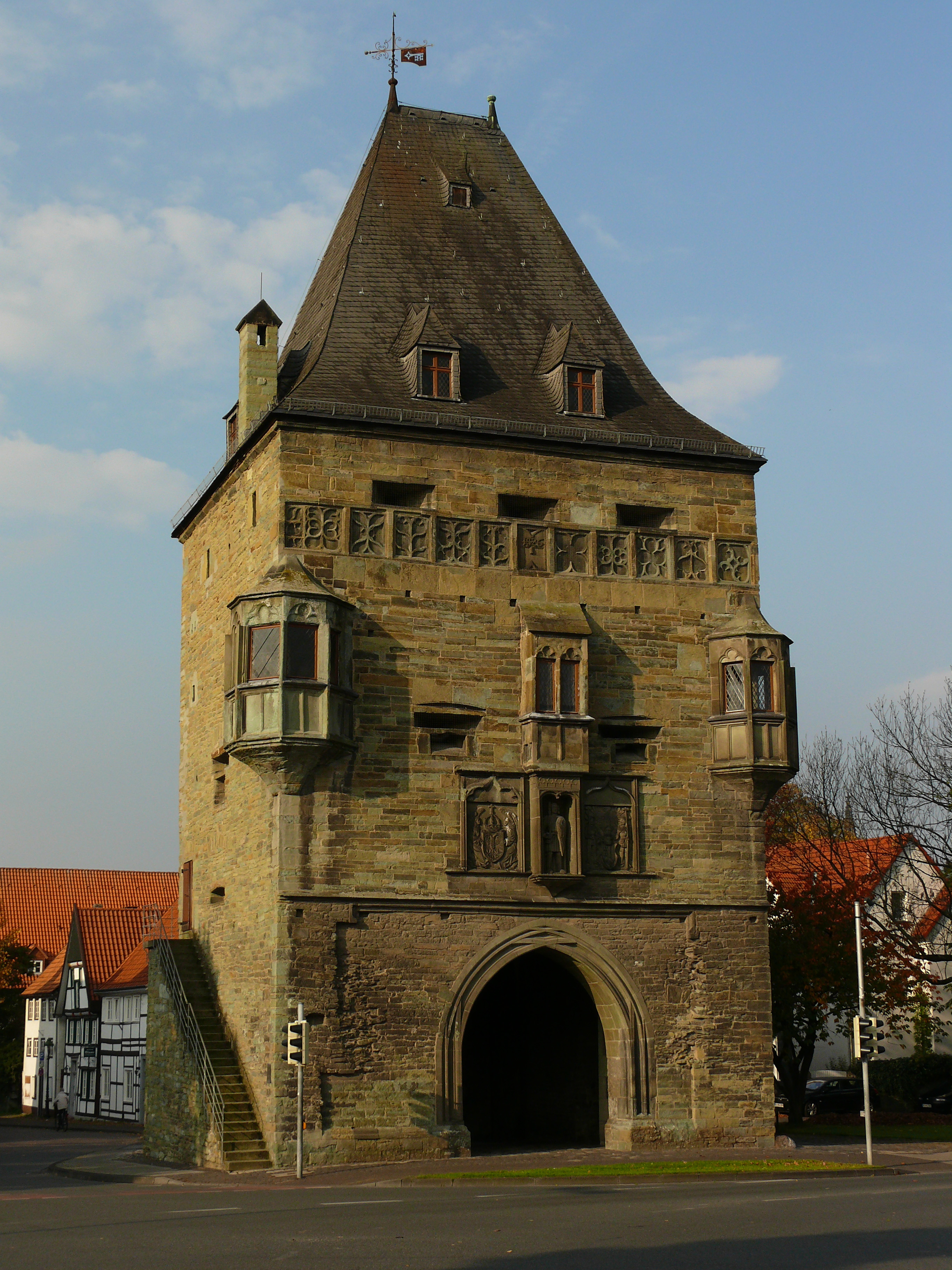 Osthofentor in SoestThis is a photograph of an architectural monument.It is on the list of cultural monuments of Soest